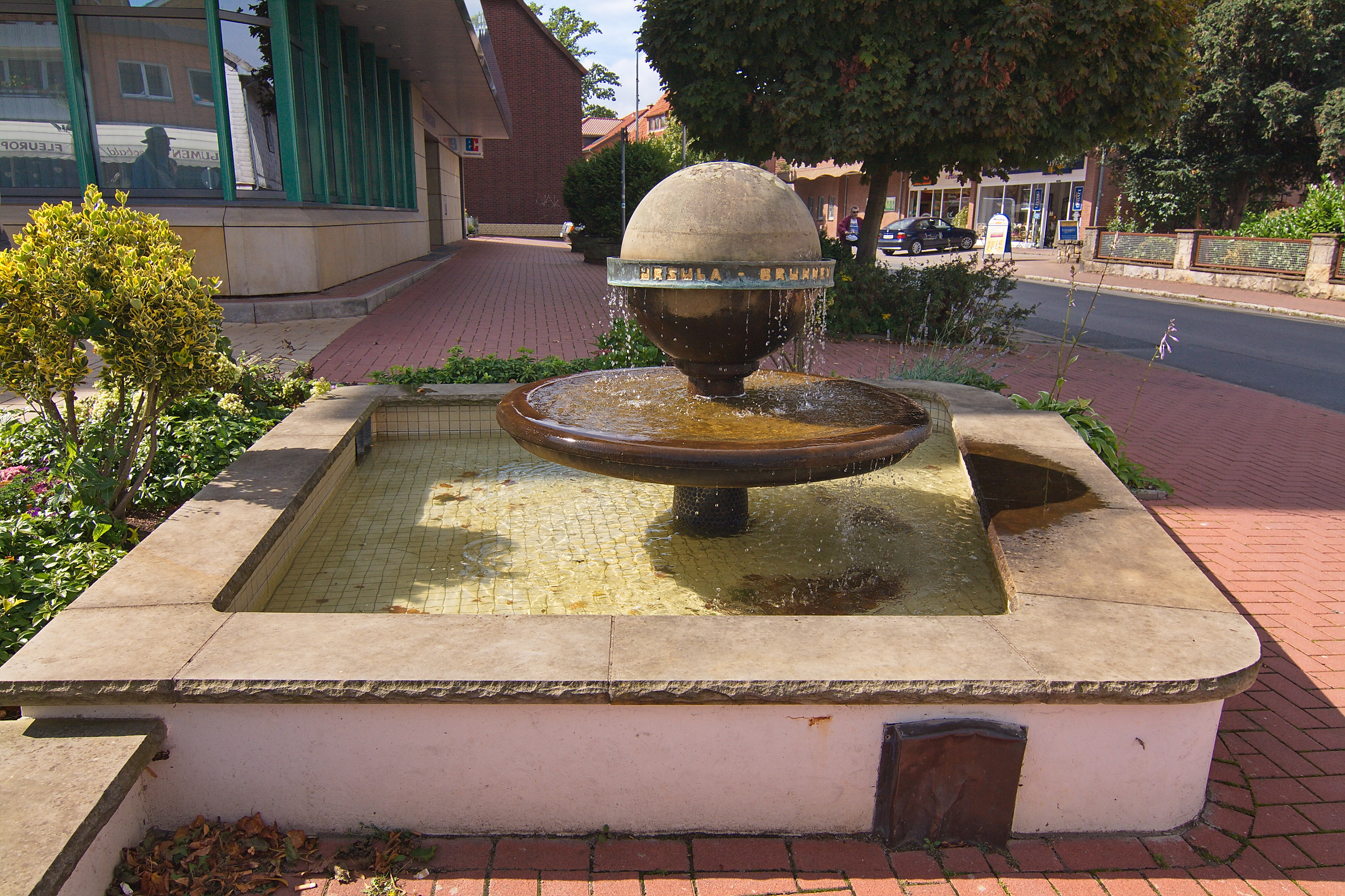 Ursula-Brunnen in Wennigsen, Niedersachsen, Deutschland